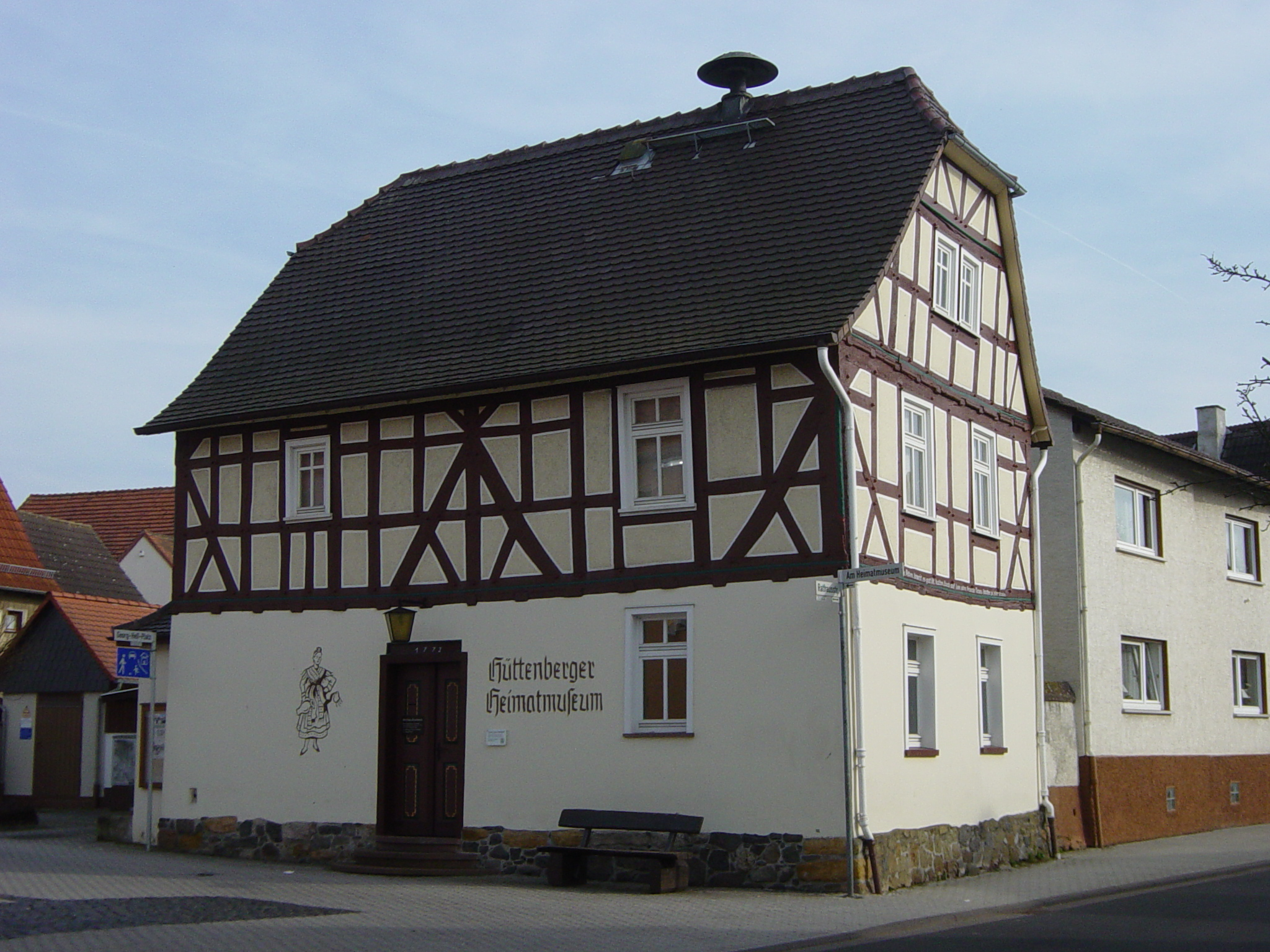 Heimatmuseum in Linden, Ortsteil Leihgestern